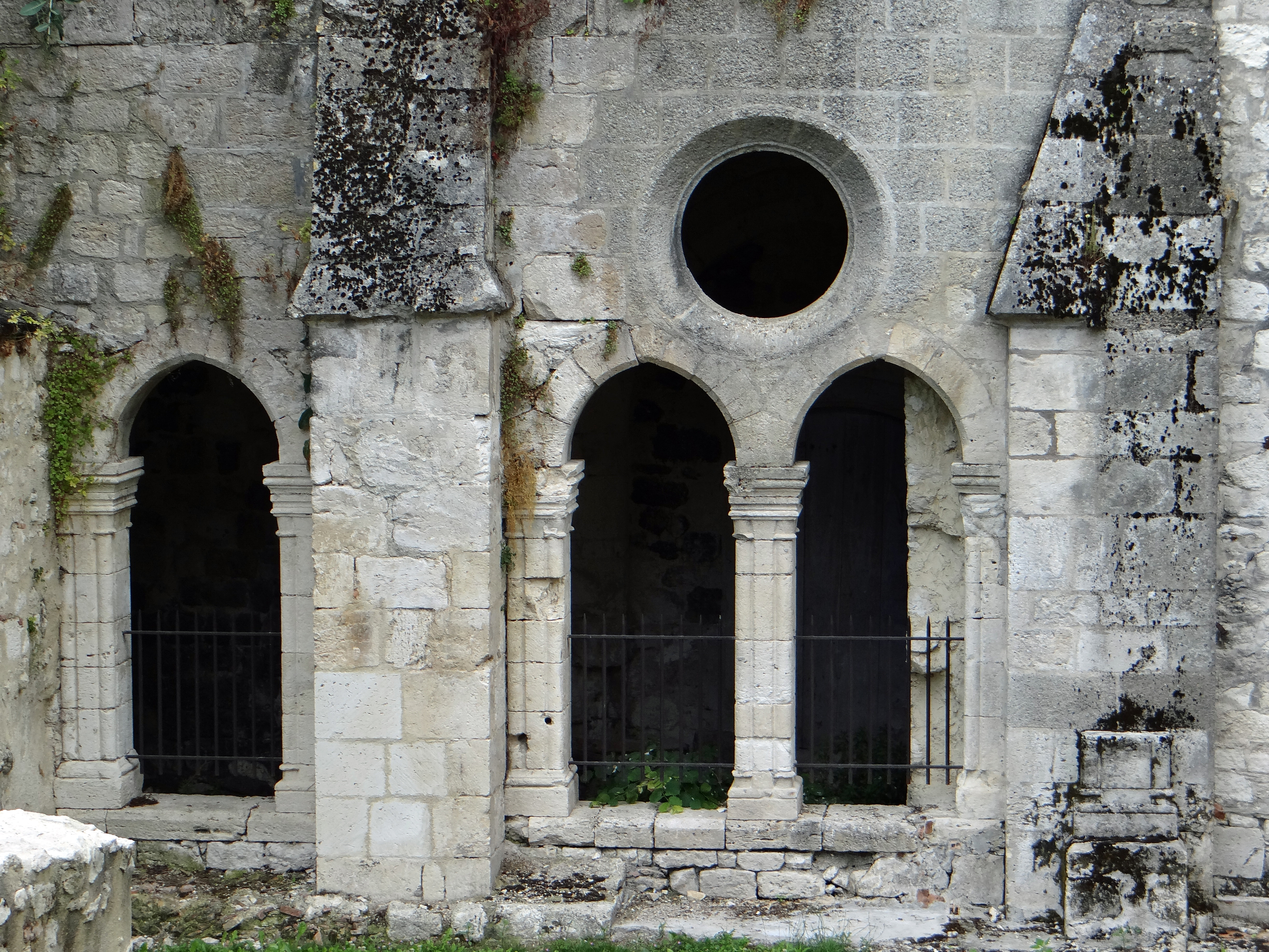 Abbaye de Saint-Maurin - Vestiges du cloître